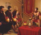 wamadat04